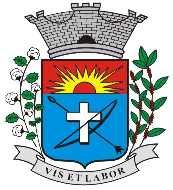 Brasão do Município de Paraguaçu Paulista/SP